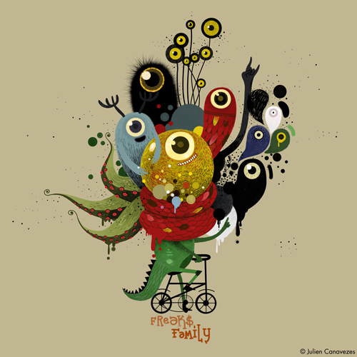 Illustration personnelle